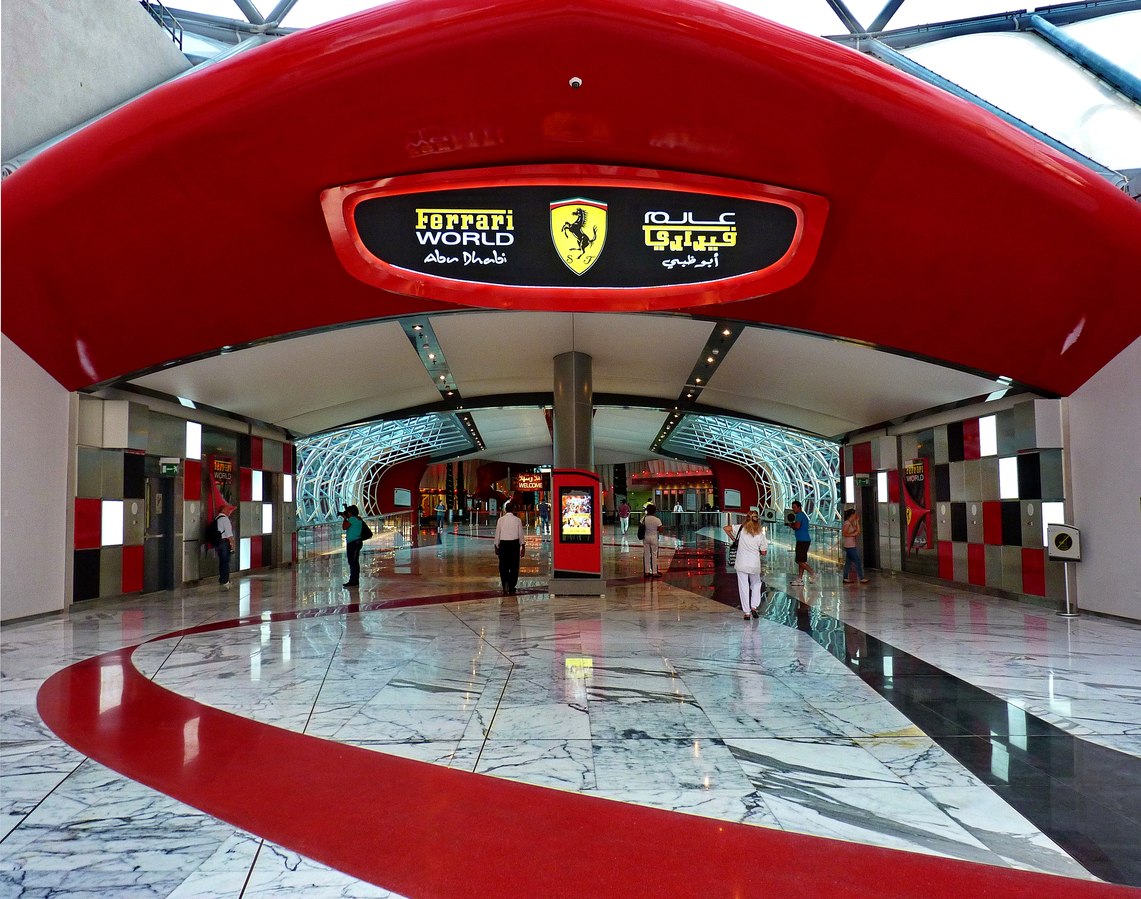 il museo Ferrari - Abu Dhabi